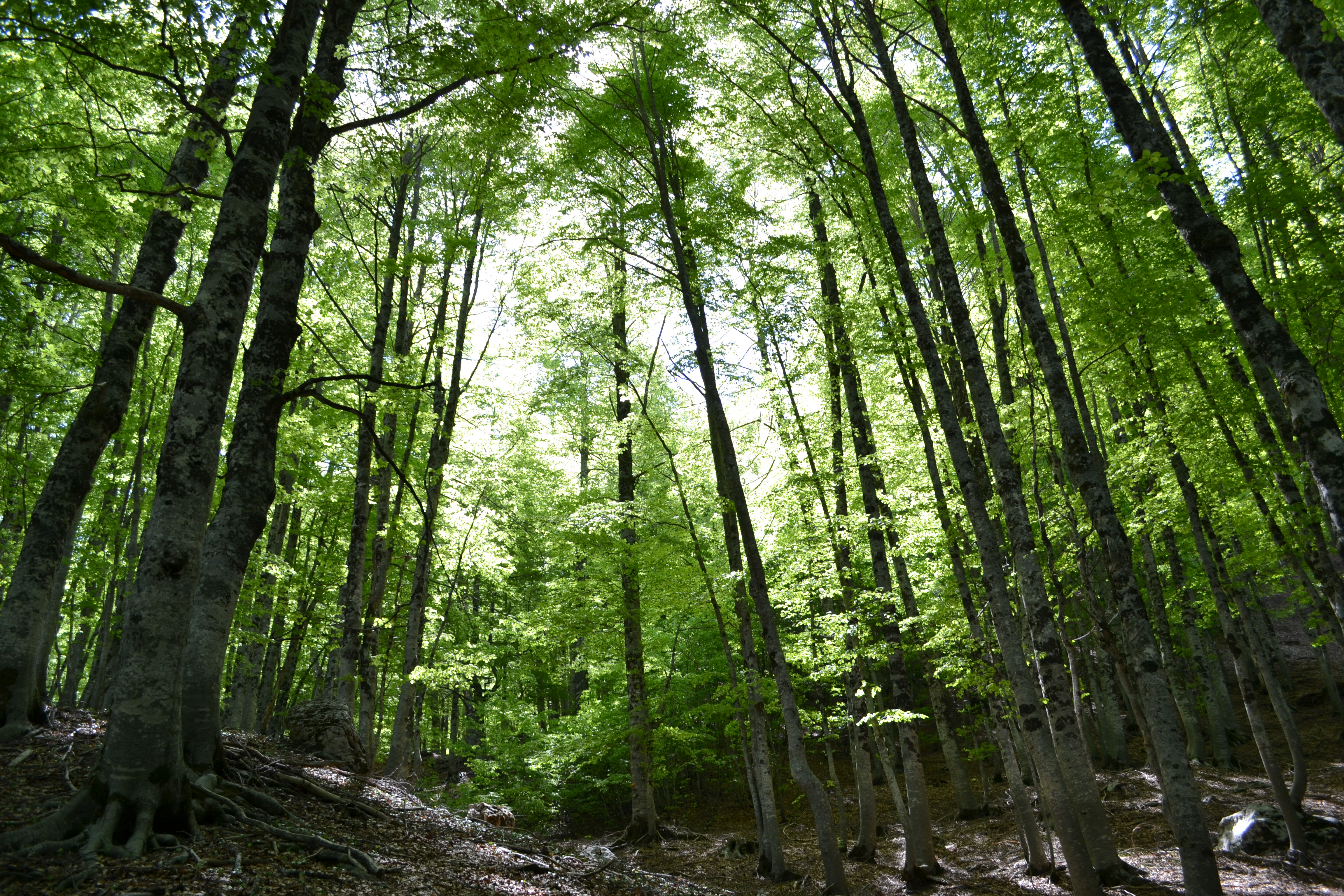 Val Fondillo This is a photo of a monument which is part of cultural heritage of Italy.